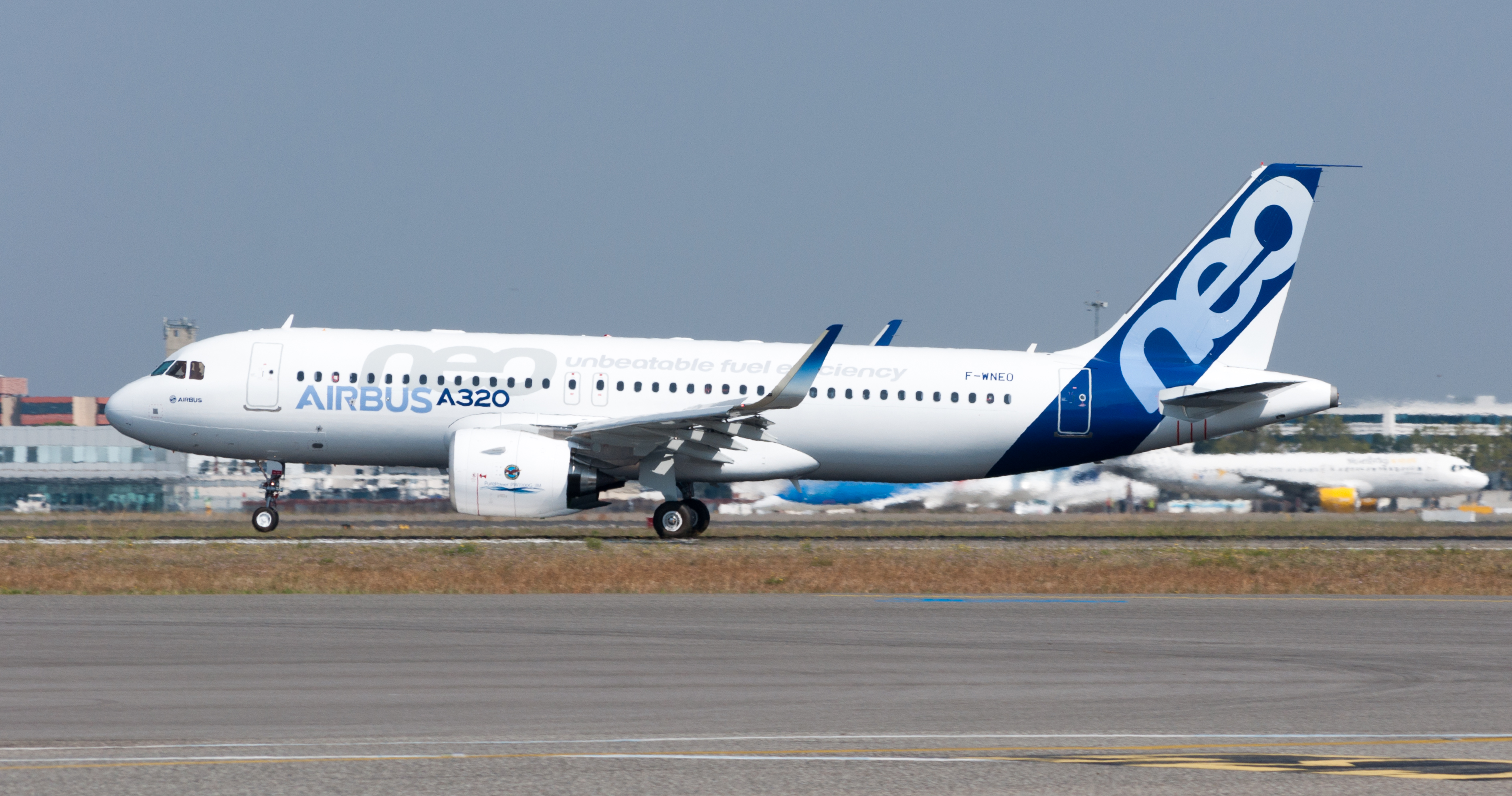 Atterrissage de l'A320neo après son premier vol